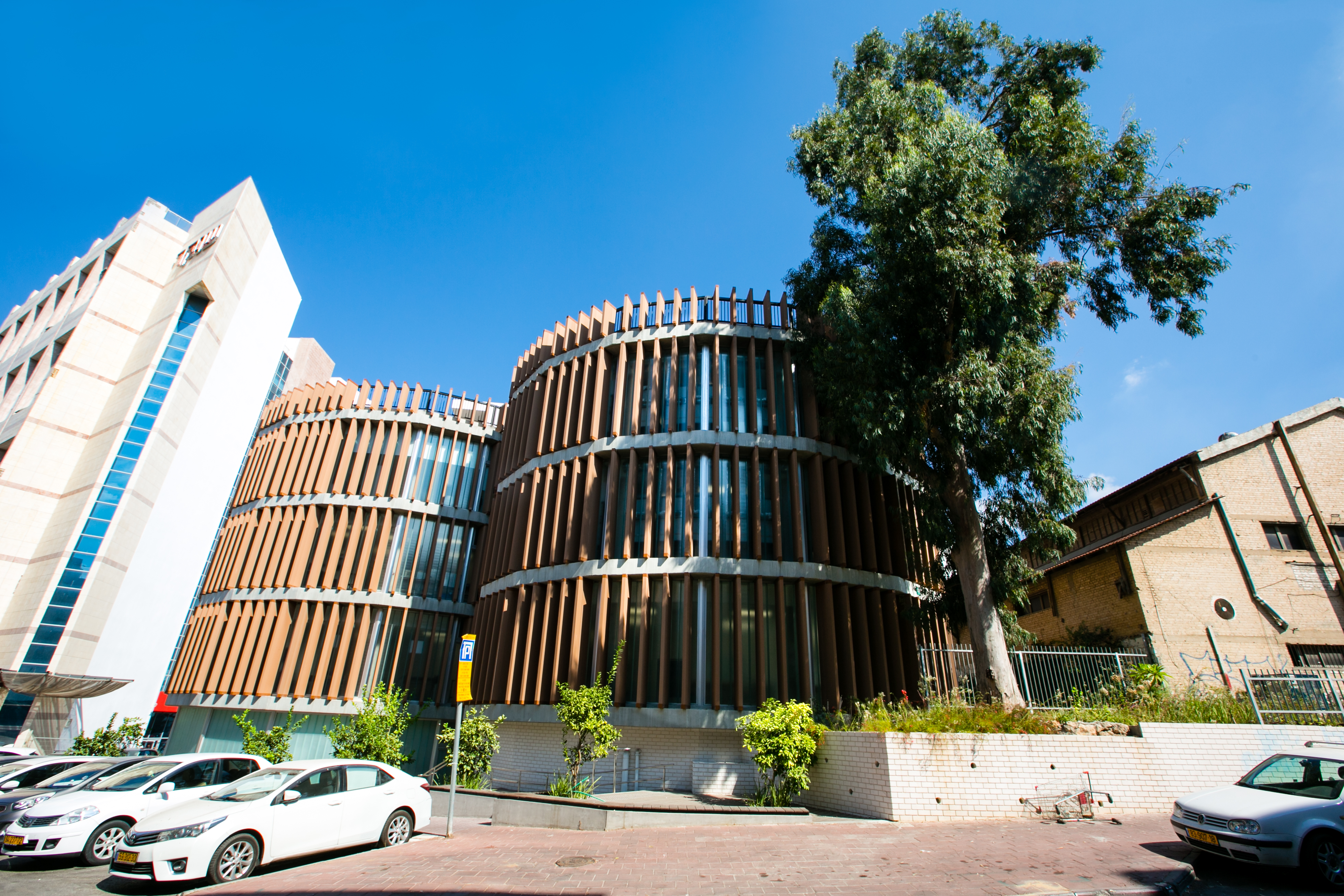 בניין שנקר החדש